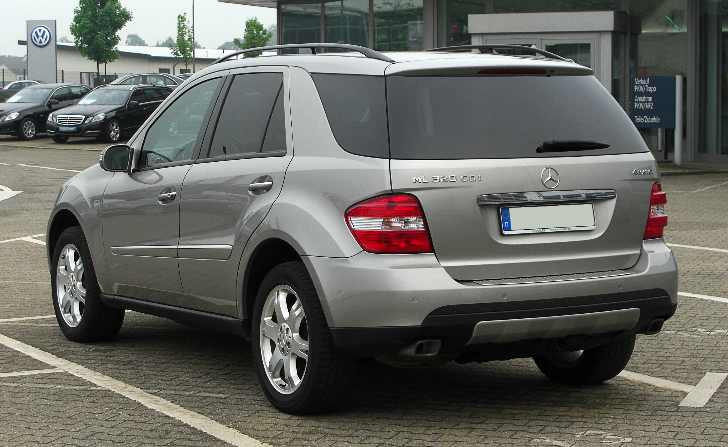 Mercedes-Benz ML 320 CDI 4MATIC (W 164)